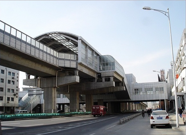 中文（中国大陆）: 陈塘庄站（地铁一号线）